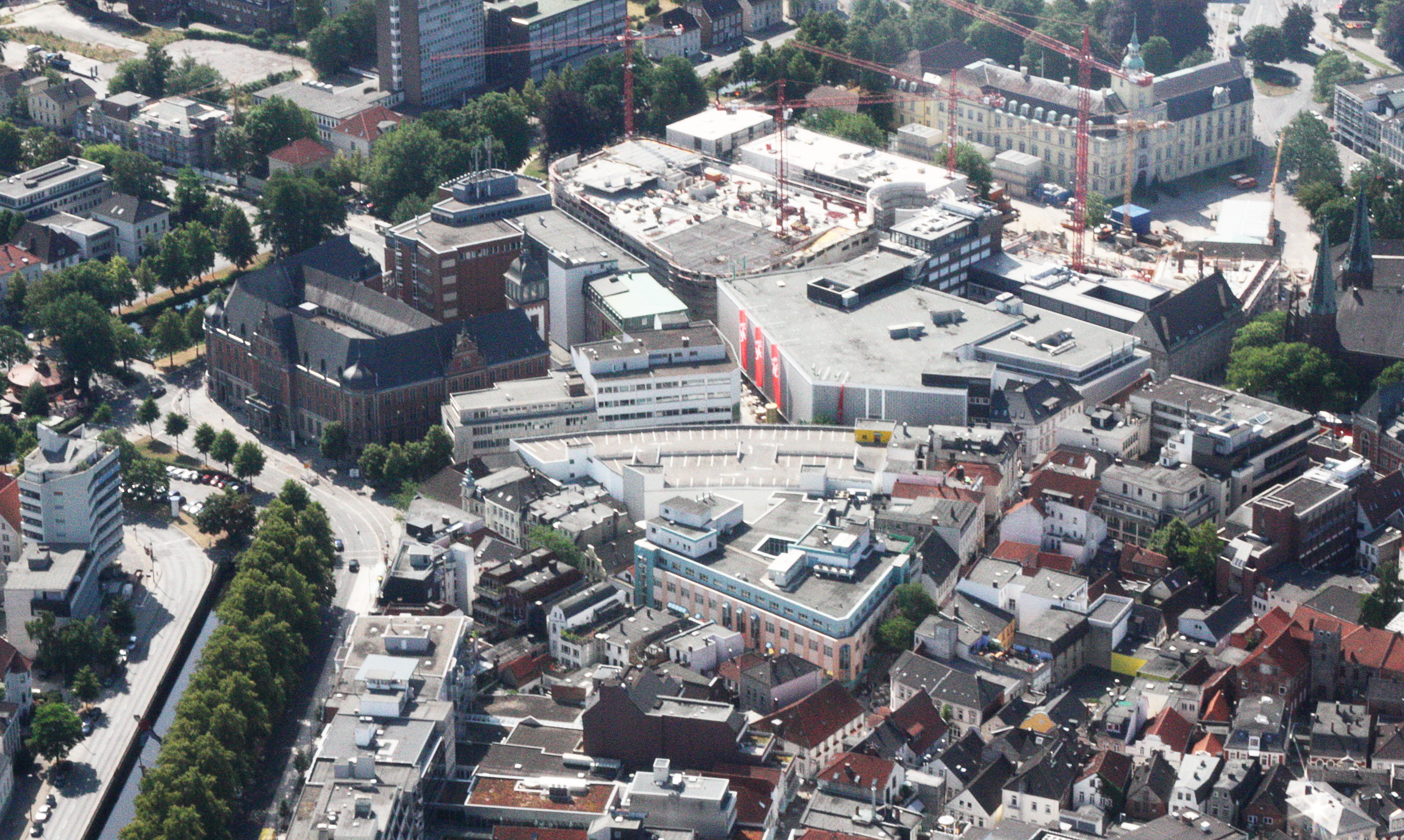 Luftaufnahmen Oldenburg (Oldenburg), mit Weiterflug nach Westen; 1500 Fuß Flughöhe; Juli 2010; Originalfoto bearbeitet: Tonwertkorrektur und Bild geschärft mit Hochpassfilter